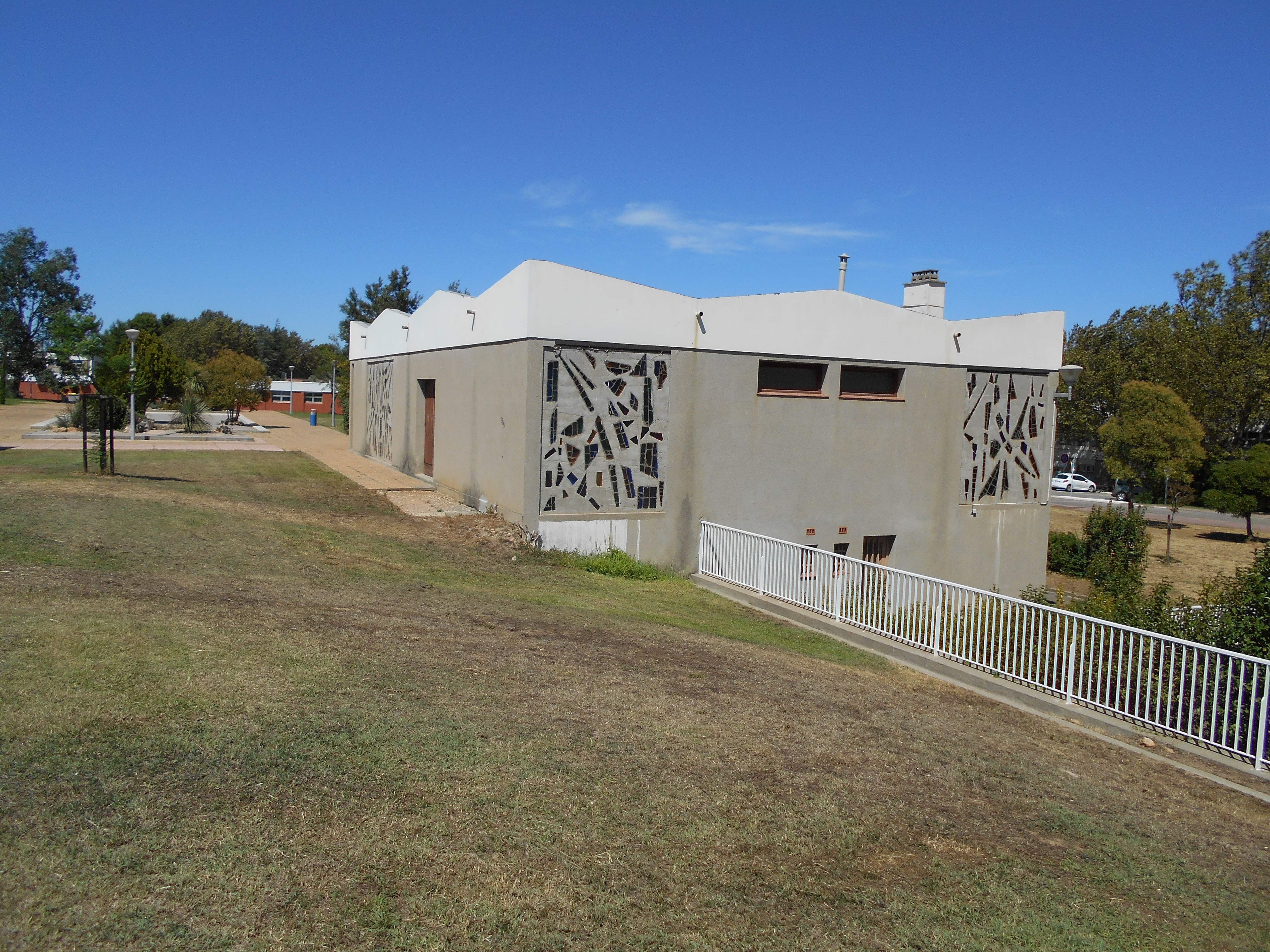 Mare de Déu de l'Esperança de l'Hospital de Tuïr